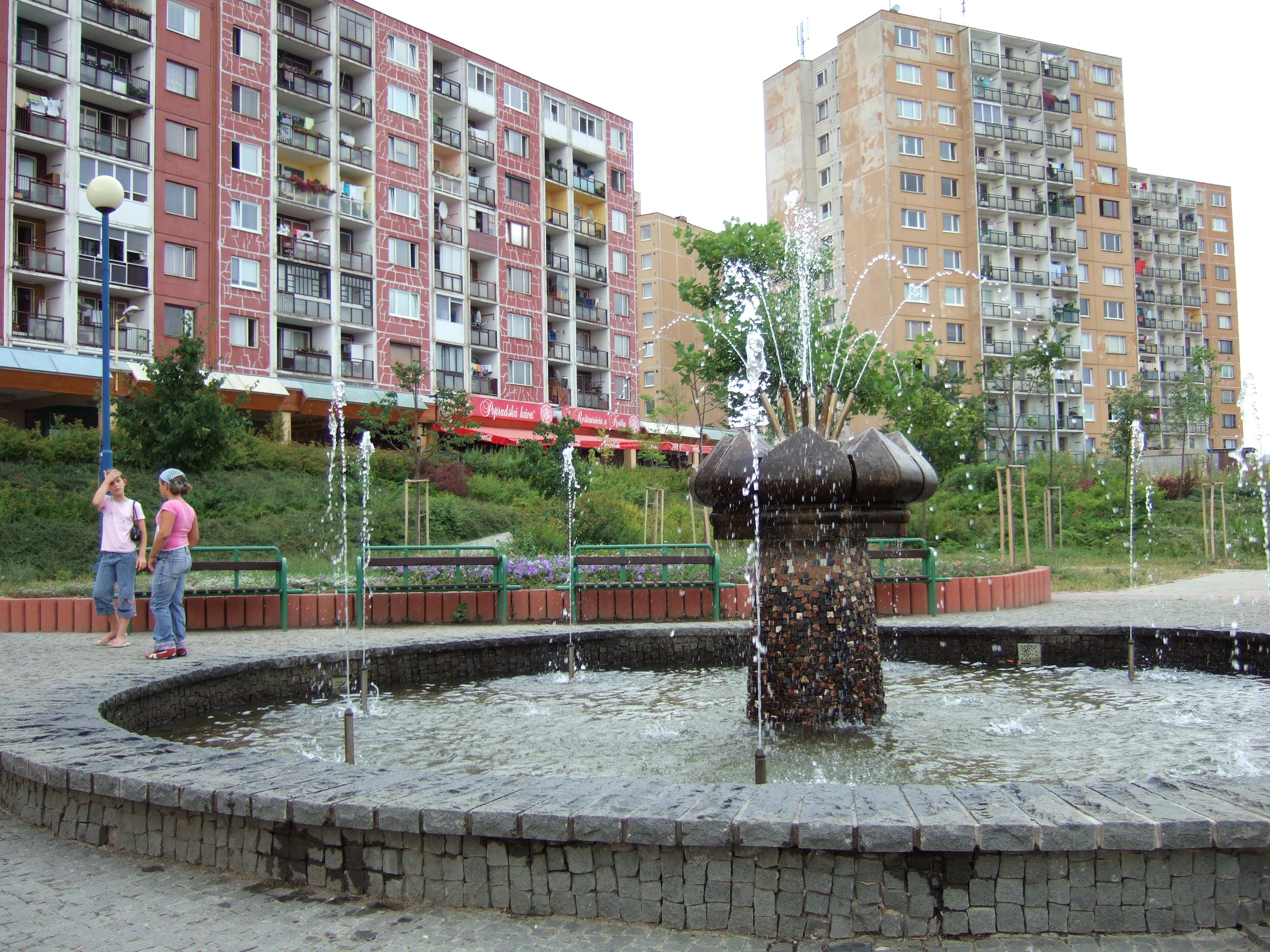 Waterworks in Košice-Sídlisko Ťahanovce, Slovakia